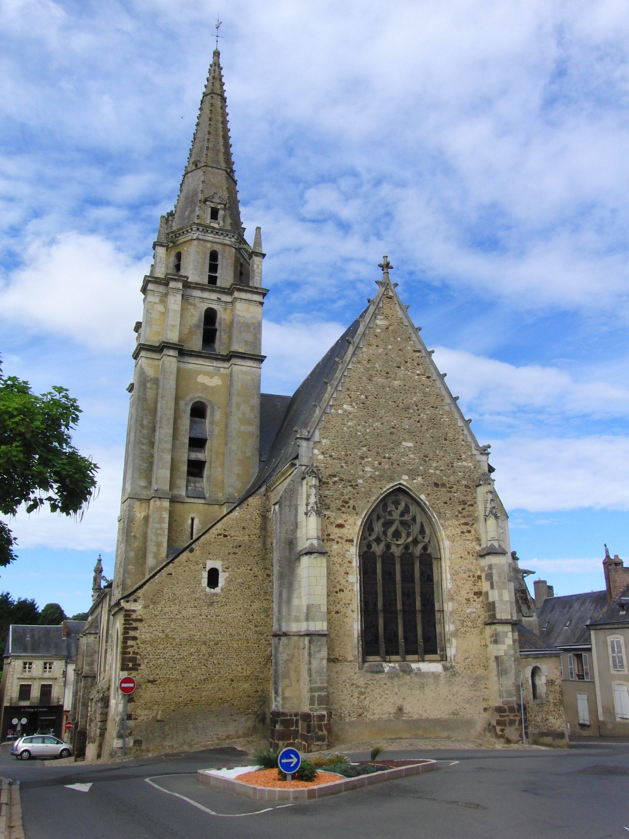 Église Notre-Dame de Saint-Calais, Sarthe, France .